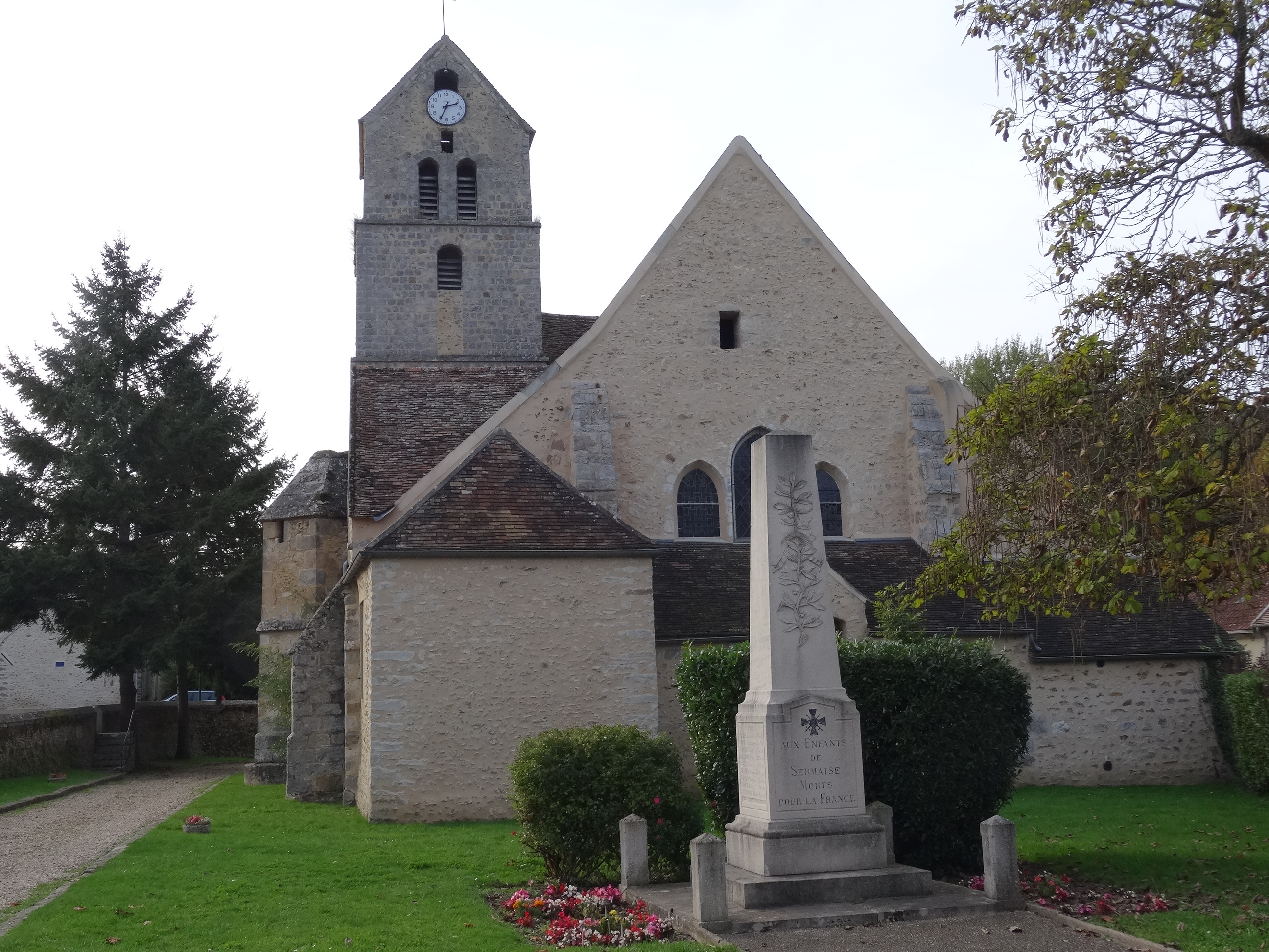 Église Sainte-Anne et monument aux morts de Sermaise. (Essonne, région Île-de-France).